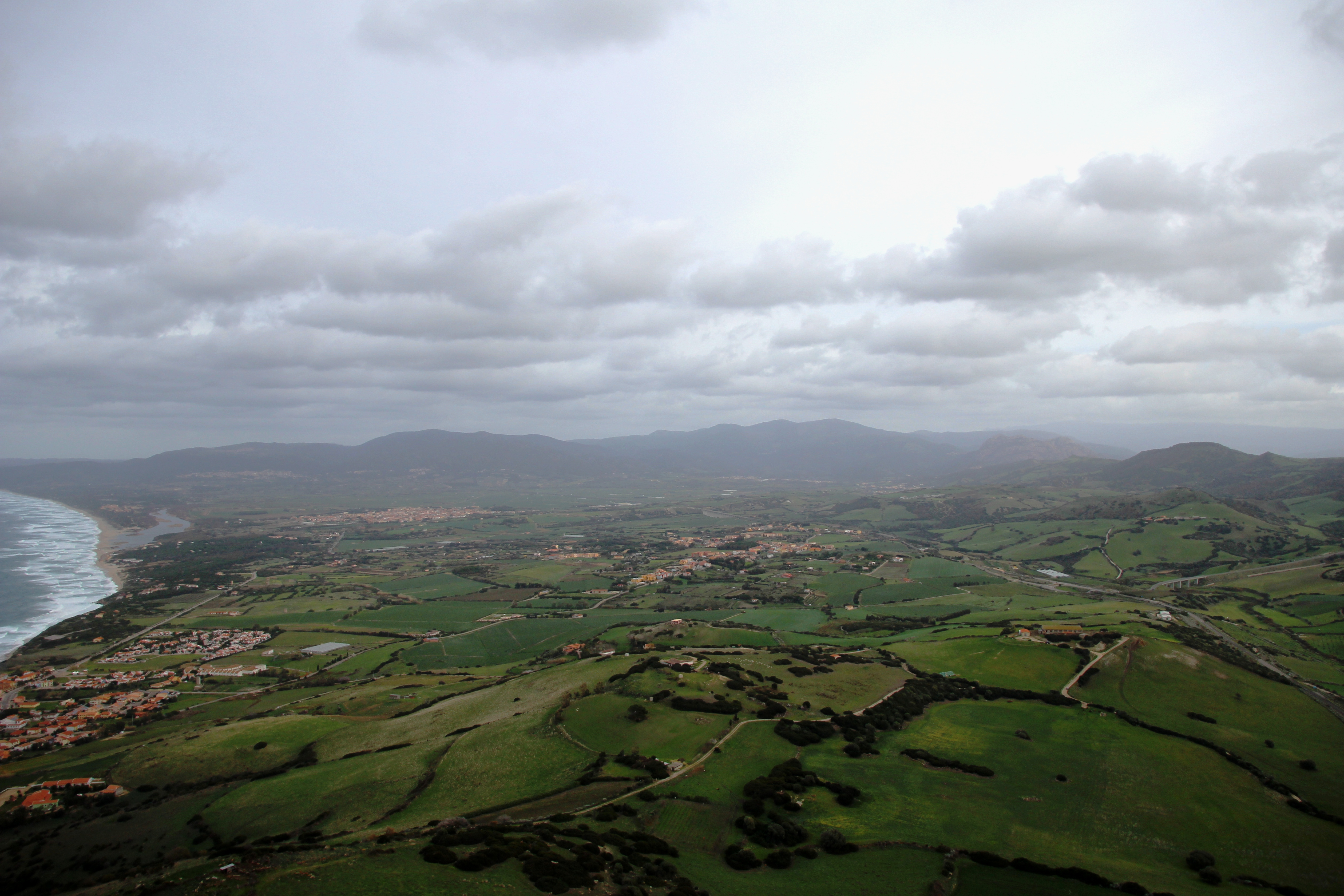 Anglona